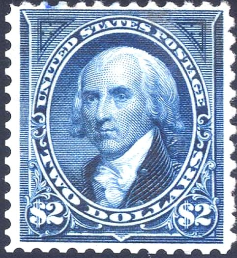 US balls